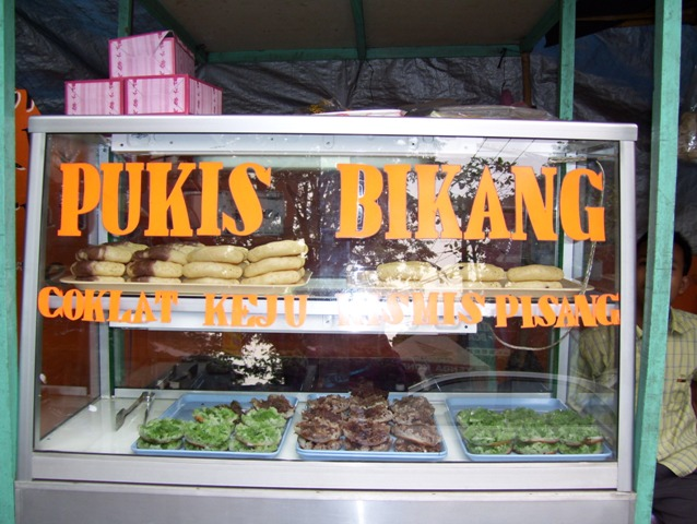 Street Vendor